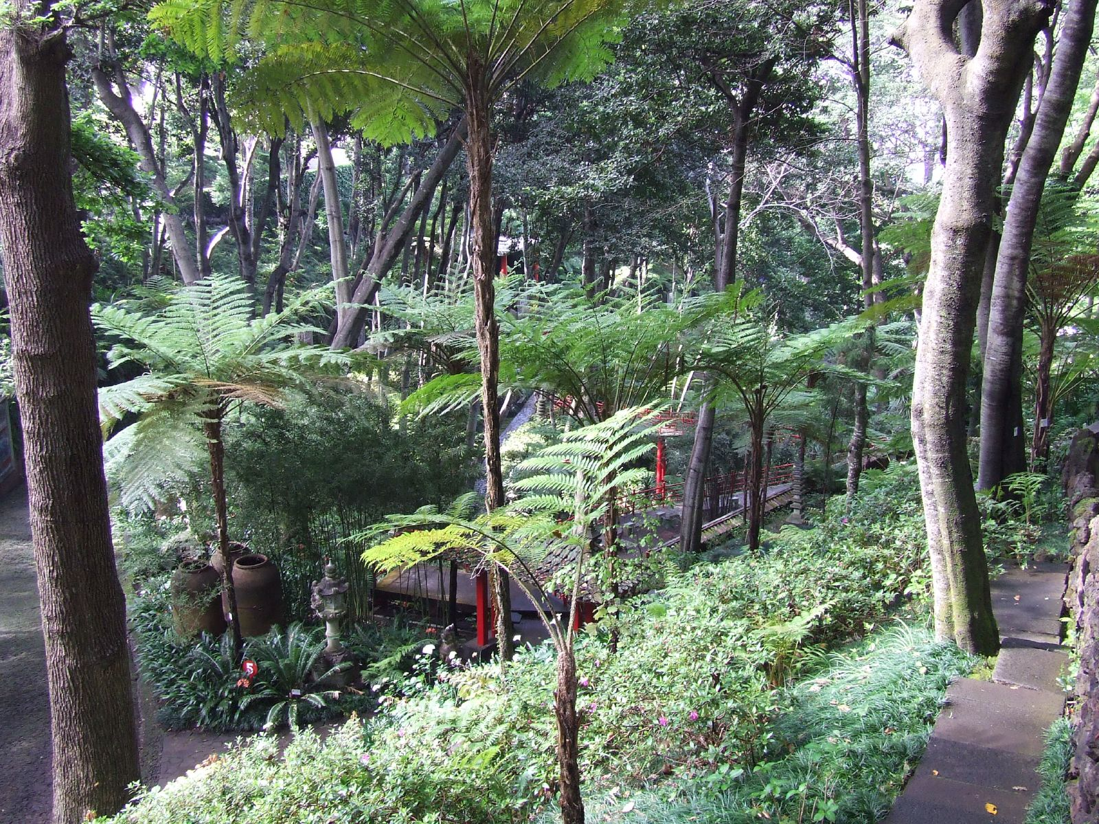 Madeira - Monte - Jardim Tropico